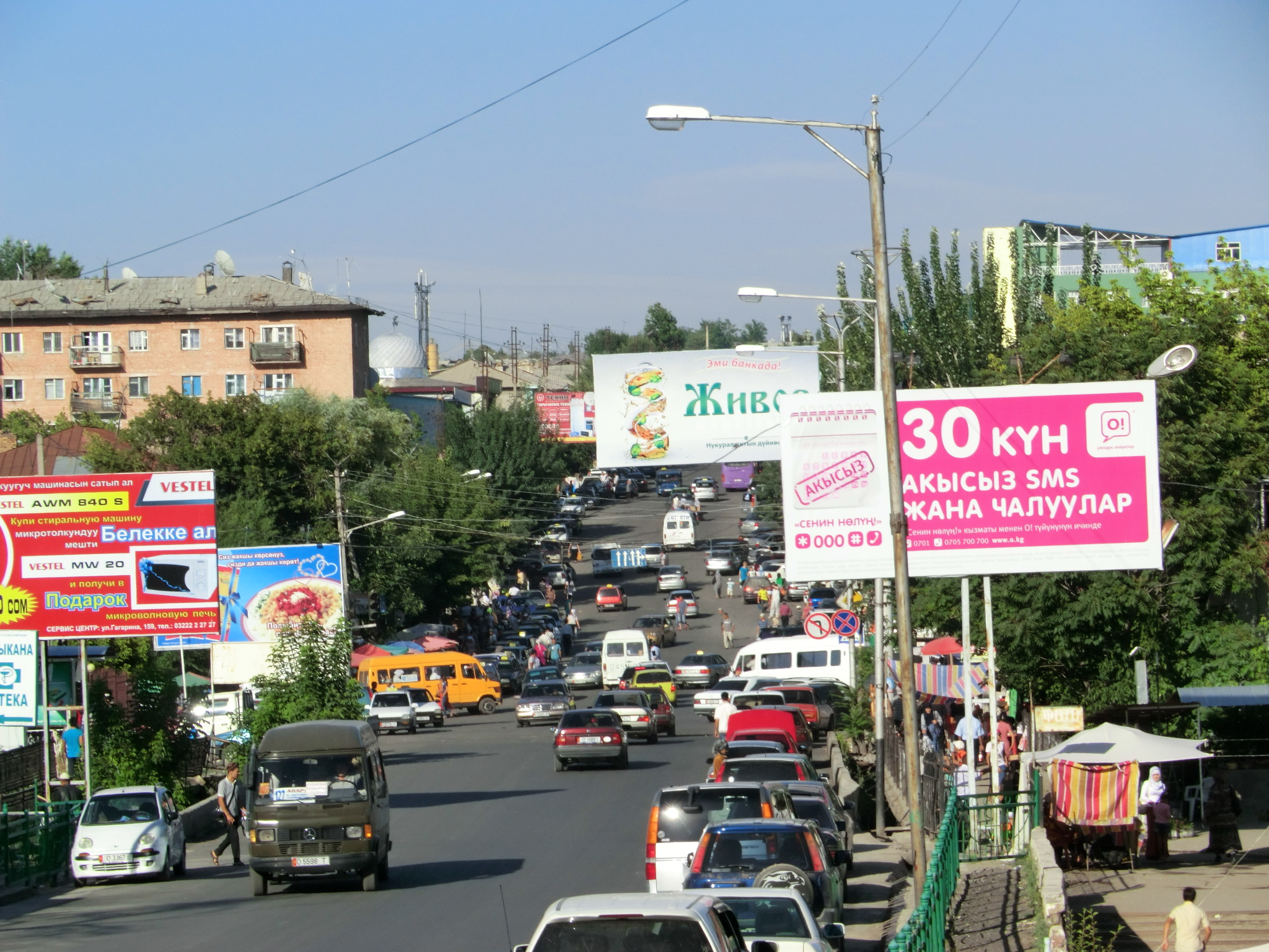 Street scene in Osh city